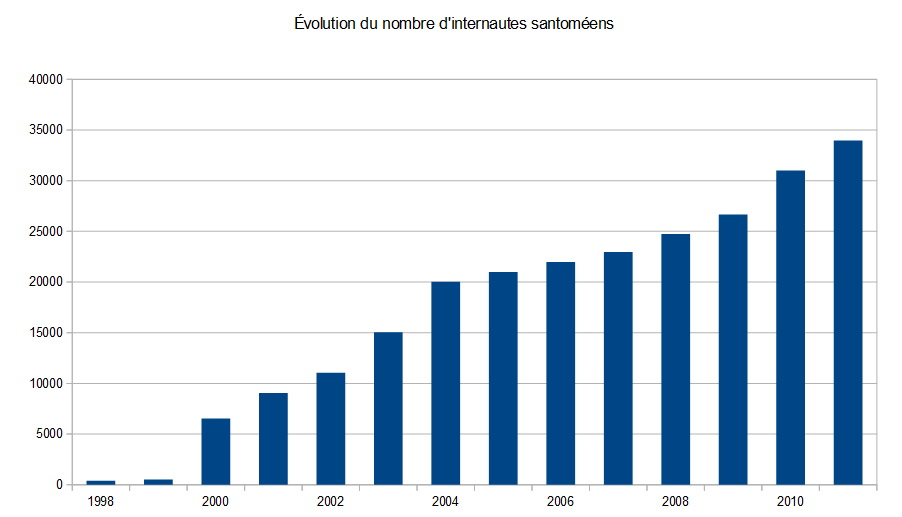 Graphique démontrant l'évolution du nombre d'internautes santoméens entre 1998 et 2011 tiré du site